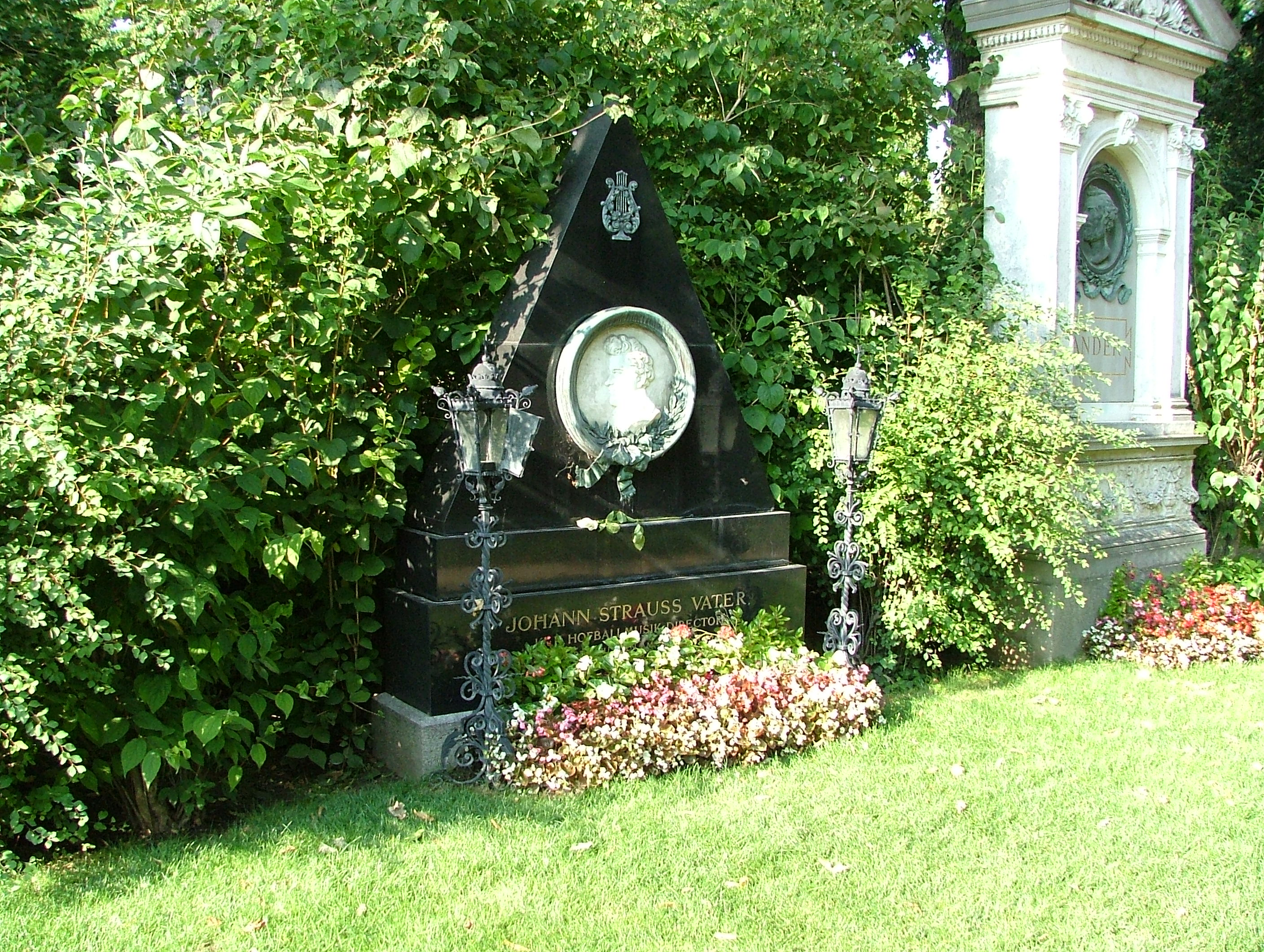 Grab von Johann Strauß (Vater) auf dem Wiener Zentralfriedhof